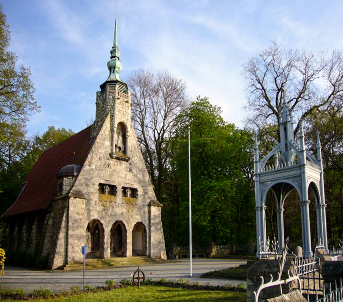 Gustav Adolf Memorial